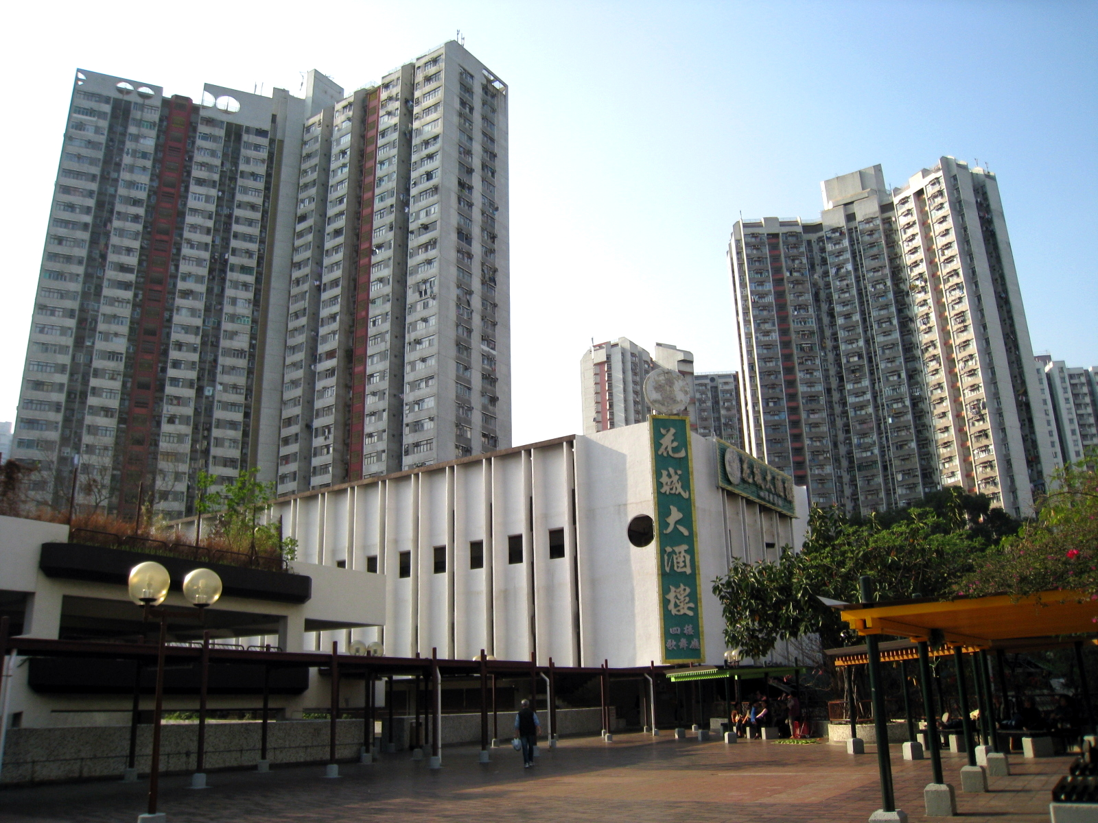 HK Tsing Yi Estate